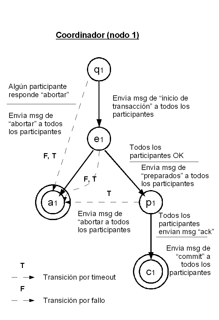 Gráfico de proceso del commit en tres fases (nodo coordinador)